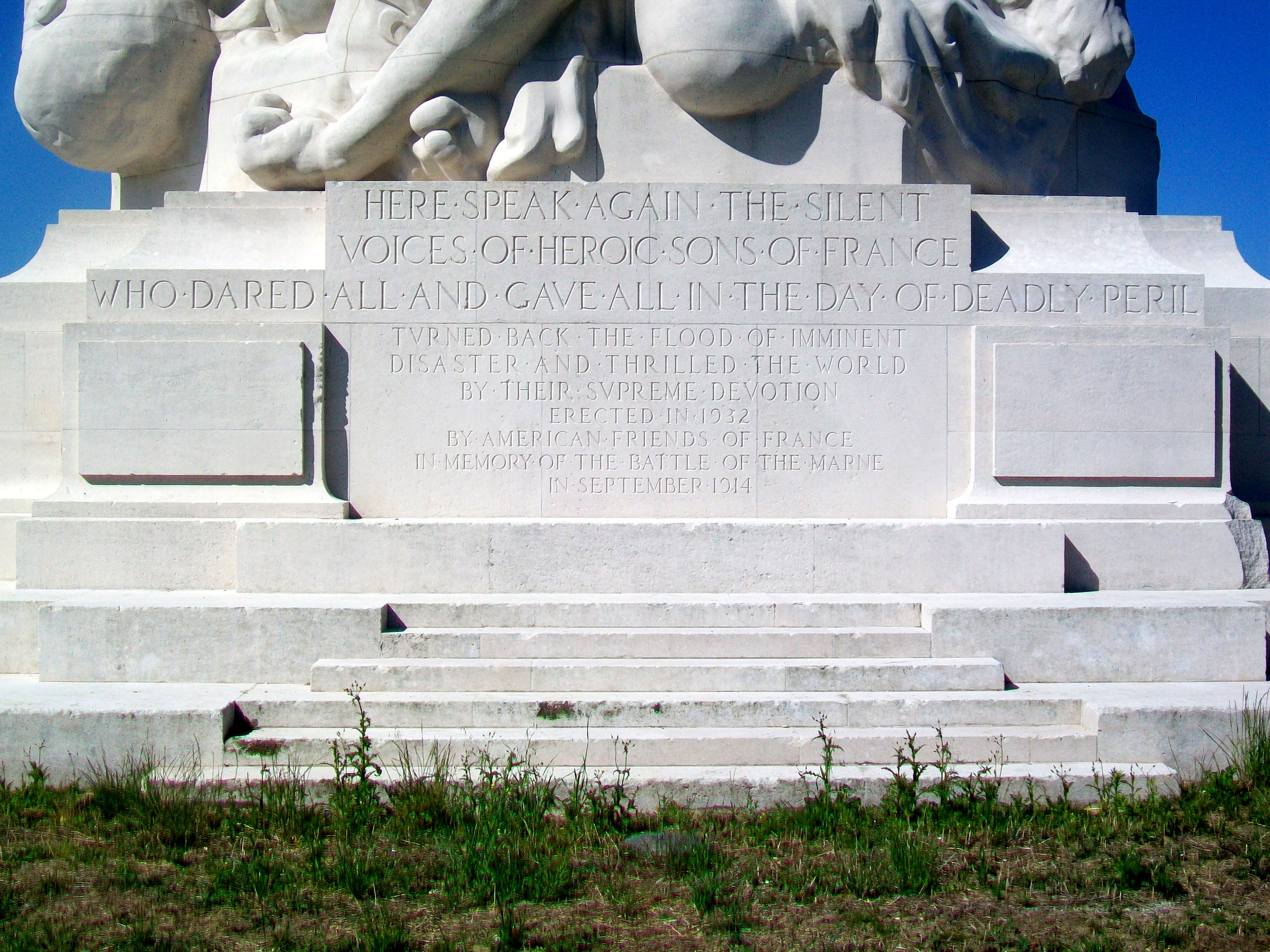 "Laa Liberté éplorée" ou "Mémorial américain", par Frederick MacMonnies, inauguré le 11 sept. 1932. Situé immédiatement au nord du Musée de la Grande Guerre du pays de Meaux. Inscription est: "Here speak again the silent voices of heroic sons of France who dared all and gave all in the day of deadly peril turned back the flood of imminent disaster and thrilled the world by their supreme devotion. Erected in 1932 by American friends of France in memory of the Battle of the Marne in september 1914"